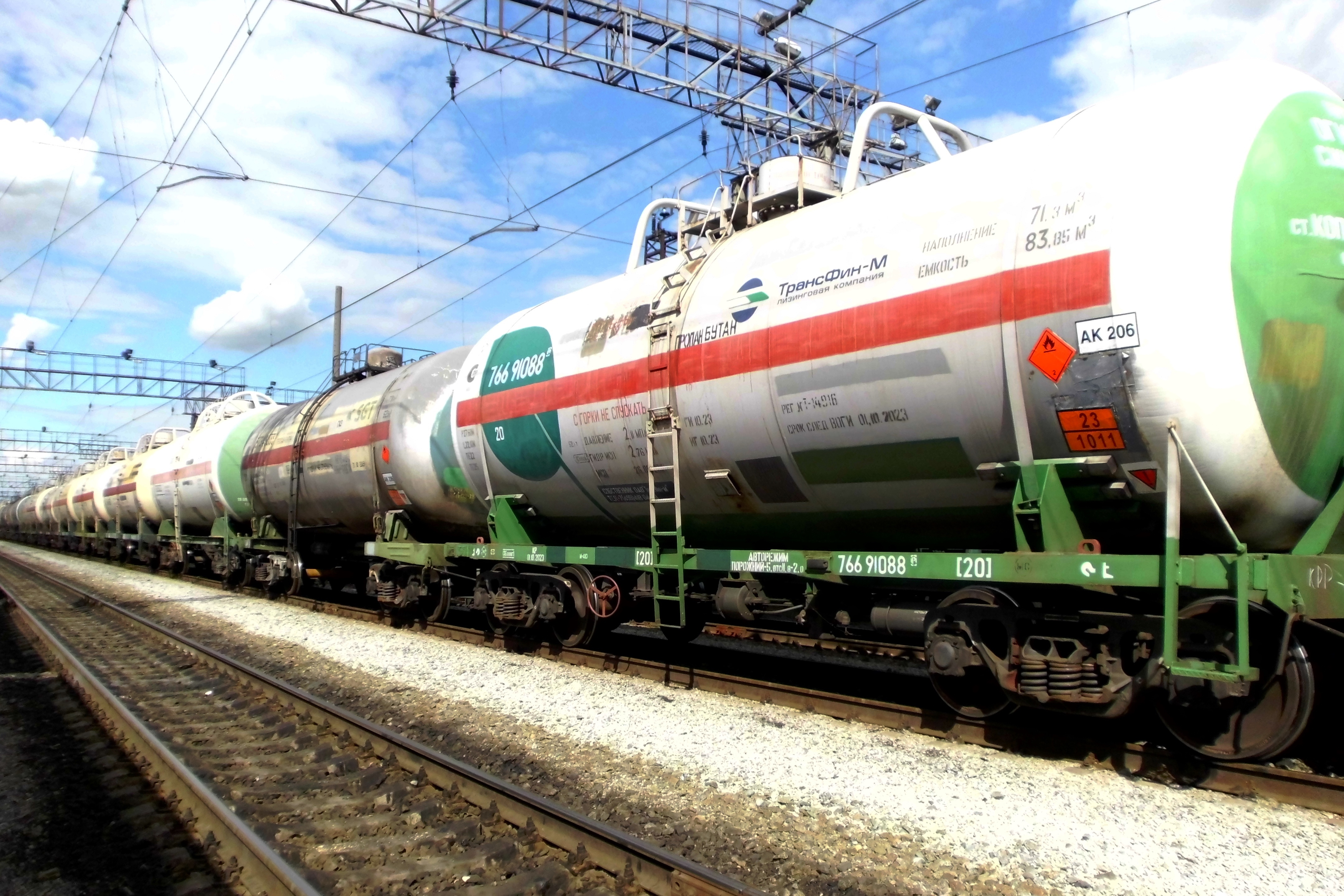 4-х осные вагоны-цистерны для сжиженных углеводородных газов (пропан-бутановая фракция) в составе поезда. Россия.